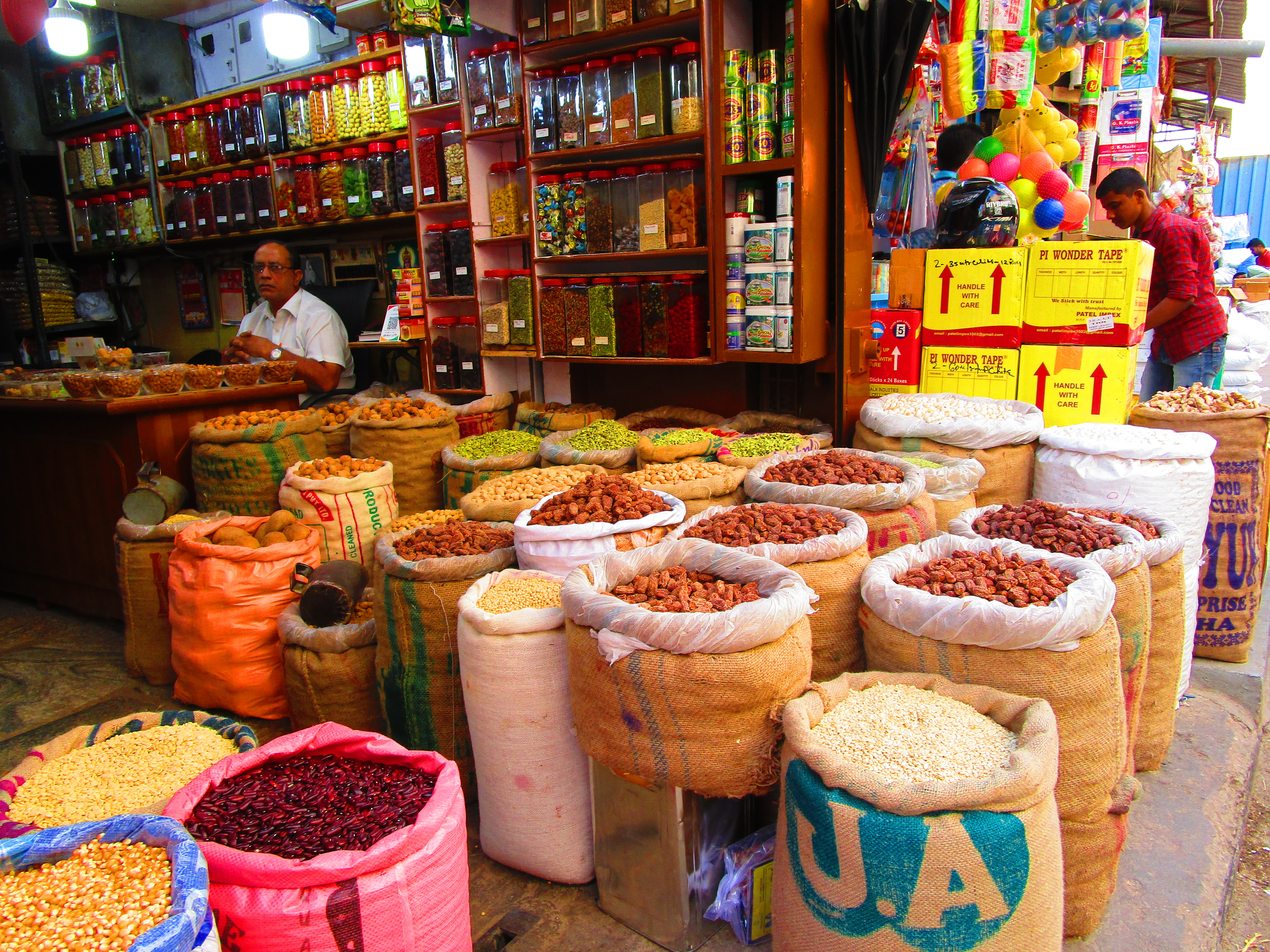 Mercado hindú, Bangalore (2020)